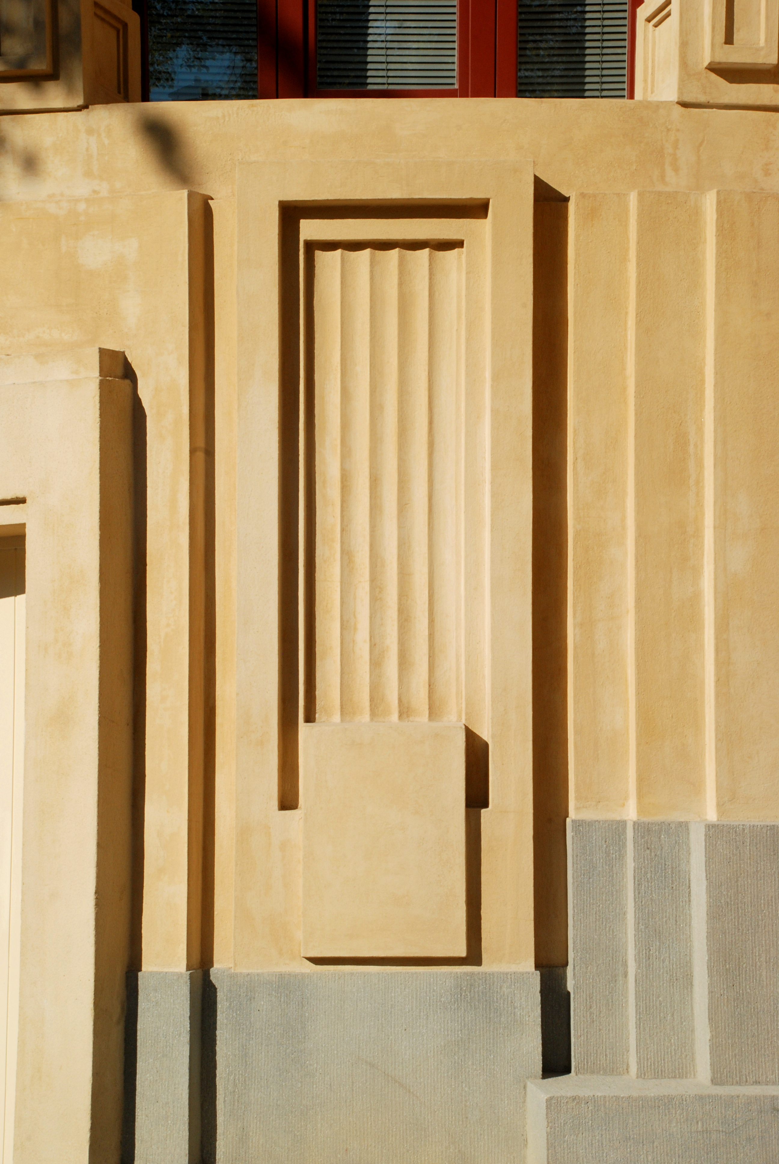 Belgique - Bruxelles - Uccle - Hôtel Haerens (Art déco - Antoine Courtens - 1928)